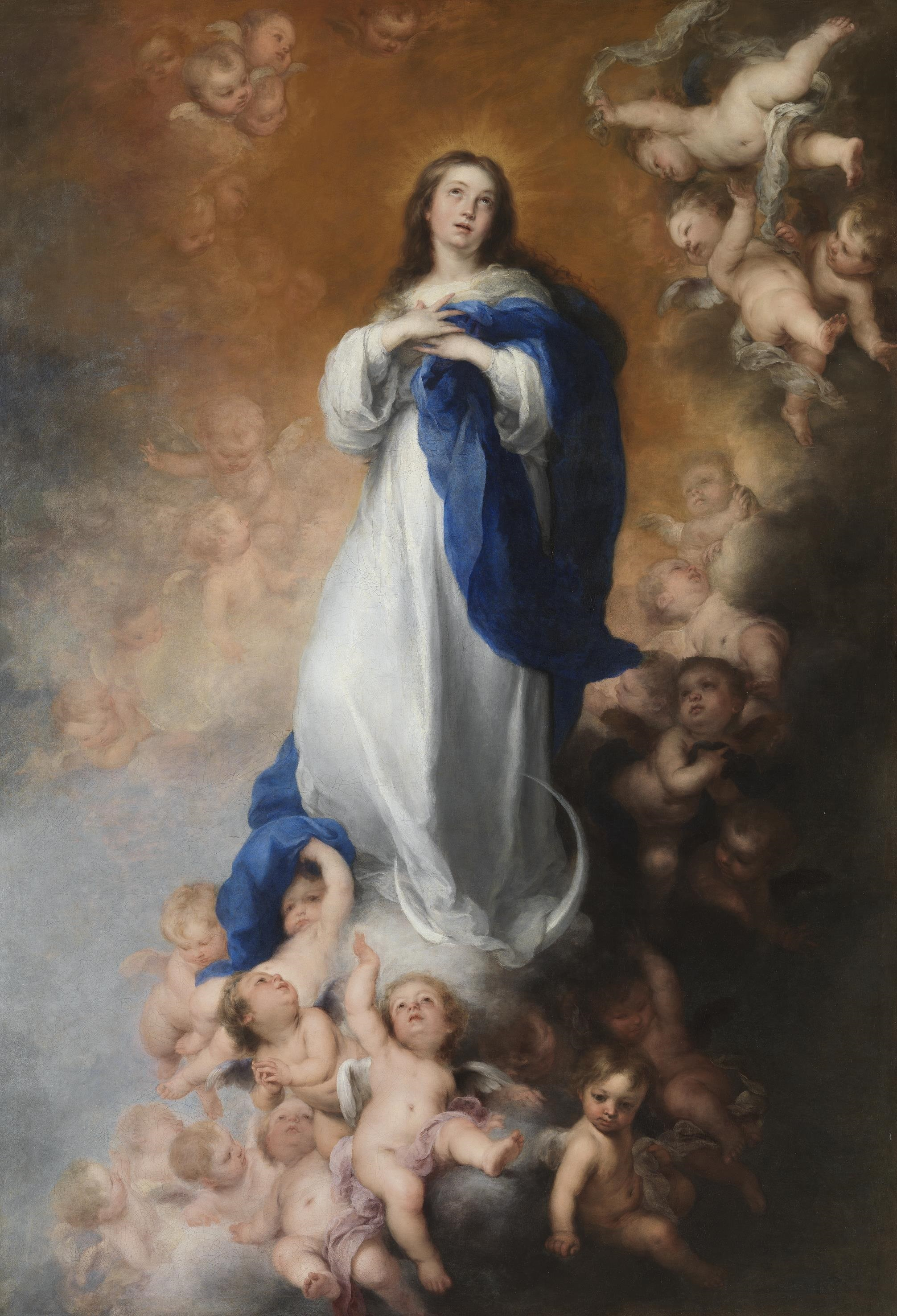 En la mayoría de las Inmaculadas de Bartolomé Esteban Murillo, de las que llegó a pintar unas veinticuatro, la Virgen María aparece vestida con una túnica blanca y un manto de color azul, con sus manos cruzadas sobre el pecho, y al mismo tiempo con una luna creciente a sus pies y con la vista puesta en el Cielo. Esta obra le fue encargada a Murillo por Justino de Neve (1625-1685), que era un canónigo de la catedral de Sevilla, con destino al Hospital de los Venerables de la ciudad de Sevilla, ya que en España se había extendido extraordinariamente desde el siglo XVI la devoción por la Inmaculada Concepción de María, siendo además dicho país el principal defensor del misterio y el que luchó con mayor insistencia hasta que se convirtió en uno de los dogmas de la Fe católica, aunque ello no ocurriría oficialmente hasta el año 1854. A lo largo de su vida, Murillo pintó unas dos docenas de Inmaculadas que en la actualidad se encuentran repartidas por todo el mundo, aunque cuatro de ellas se conservan en el Museo del Prado y otras tantas en el Museo de Bellas Artes de Sevilla, la ciudad natal del pintor.